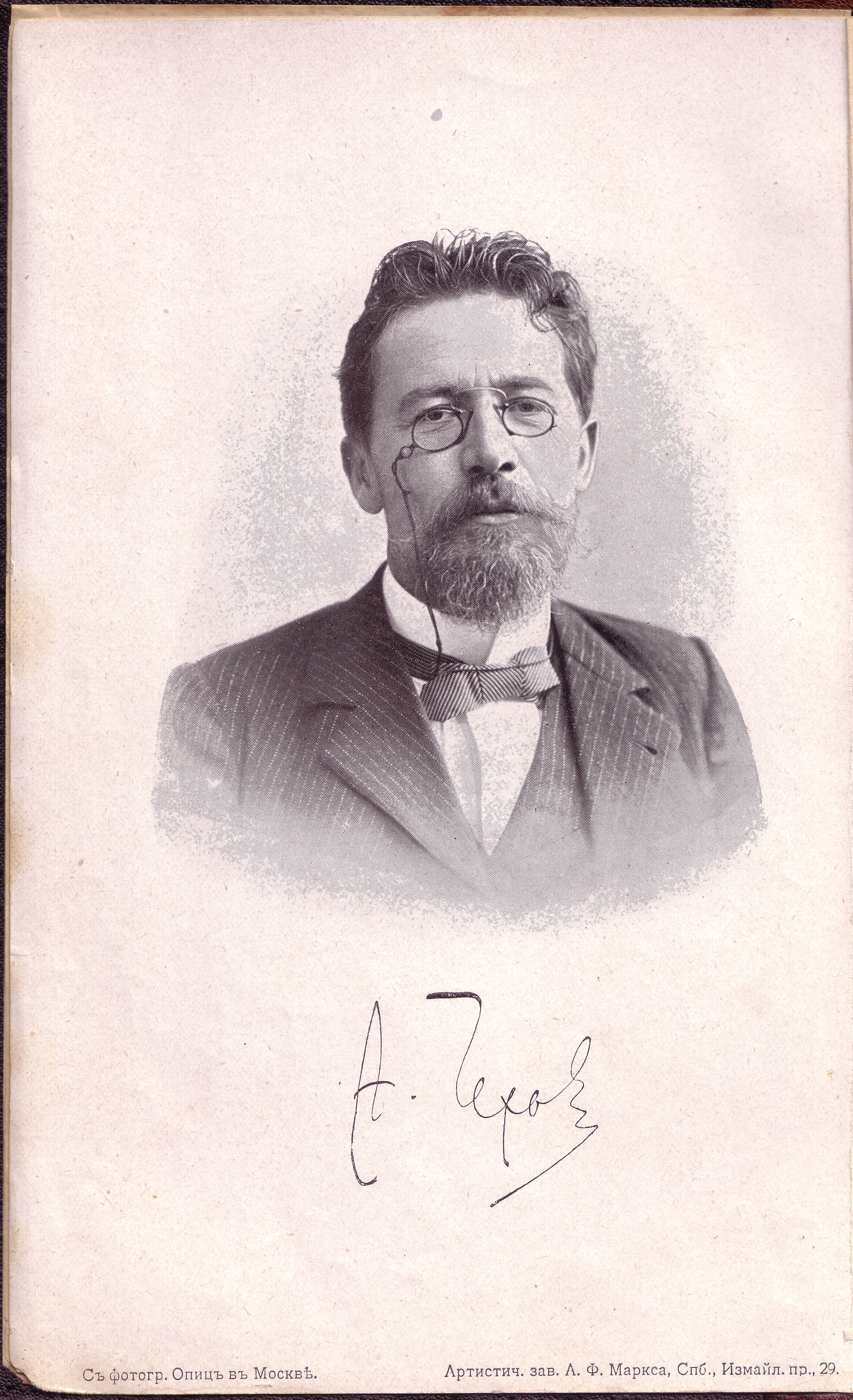 Портрет А.П. Чехова с автографом. 1-й том прижизненного ПСС в 16 томах. Приложение к " :ru:Нива (журнал) |Ниве ", издательство Маркса, СПб, 1902.